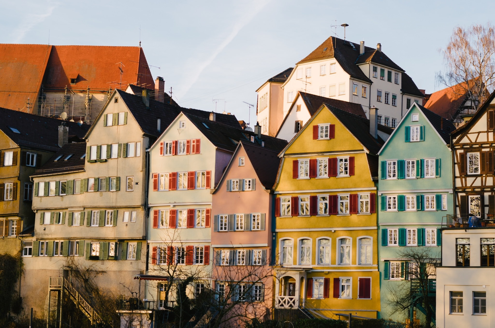 Bunte Häuser am Neckar in Tübingen